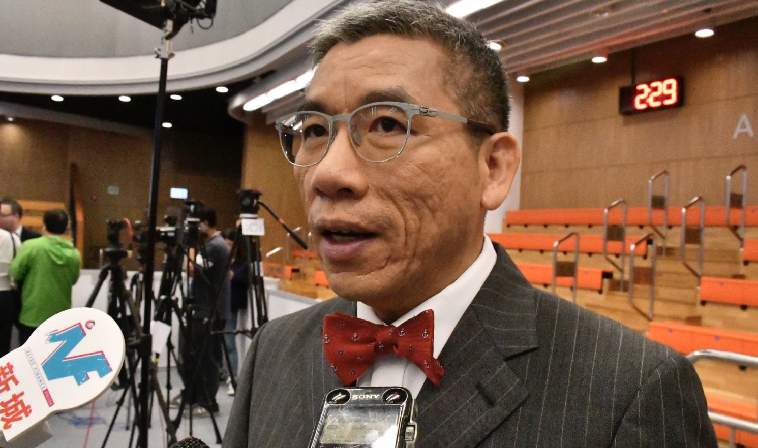 香港嶺南大學公共管治研究部主任李彭廣。(美國之音湯惠芸攝)